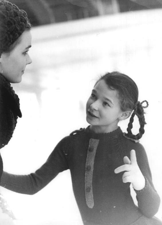 Anett Pötsch ADN-ZB Mittelstädt 2.2.1973 Berlin: Vorbereitung Eiskunstlauf-Europameisterschaften.- Anett Pötsch, 12 Jahre jung, wird die DDR bei den Eiskunstlauf-Europameisterschaften vom 6. - 11.2.1973 in Köln vertreten. Die talentierte Nachwuchsläuferin wurde in den letzten Jahren von der 2-fachen Weltmeisterin Gabriele Rüger-Seyfert trainiert.